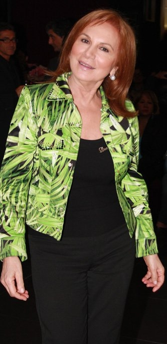 Rosanna Lambertucci